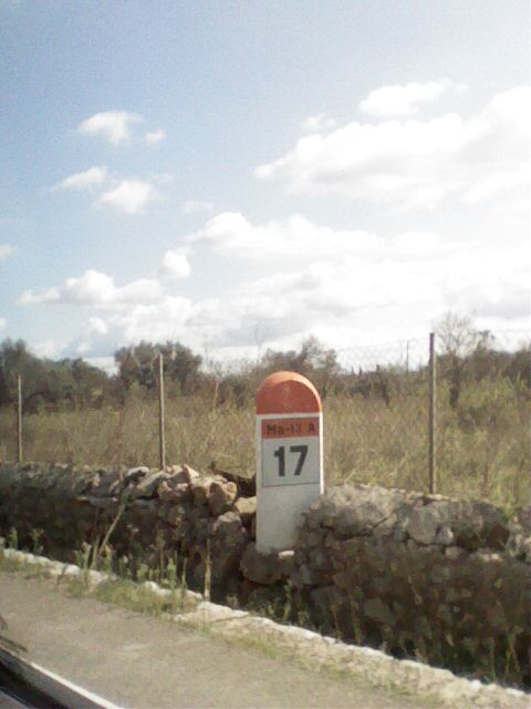 Mojón kilómetrico de la Ma-13A